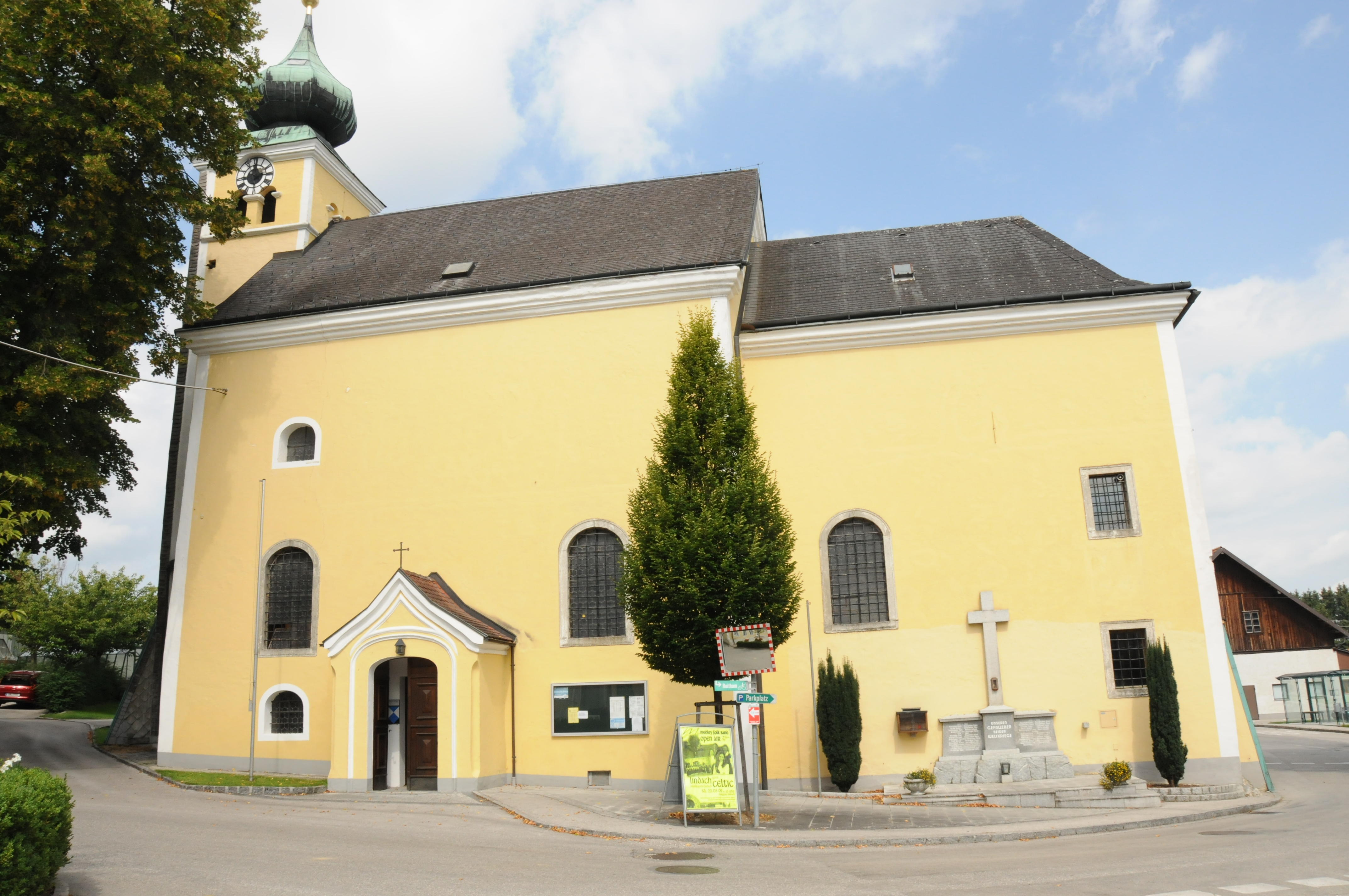 Kath. Pfarrkirche hl. Margarethe